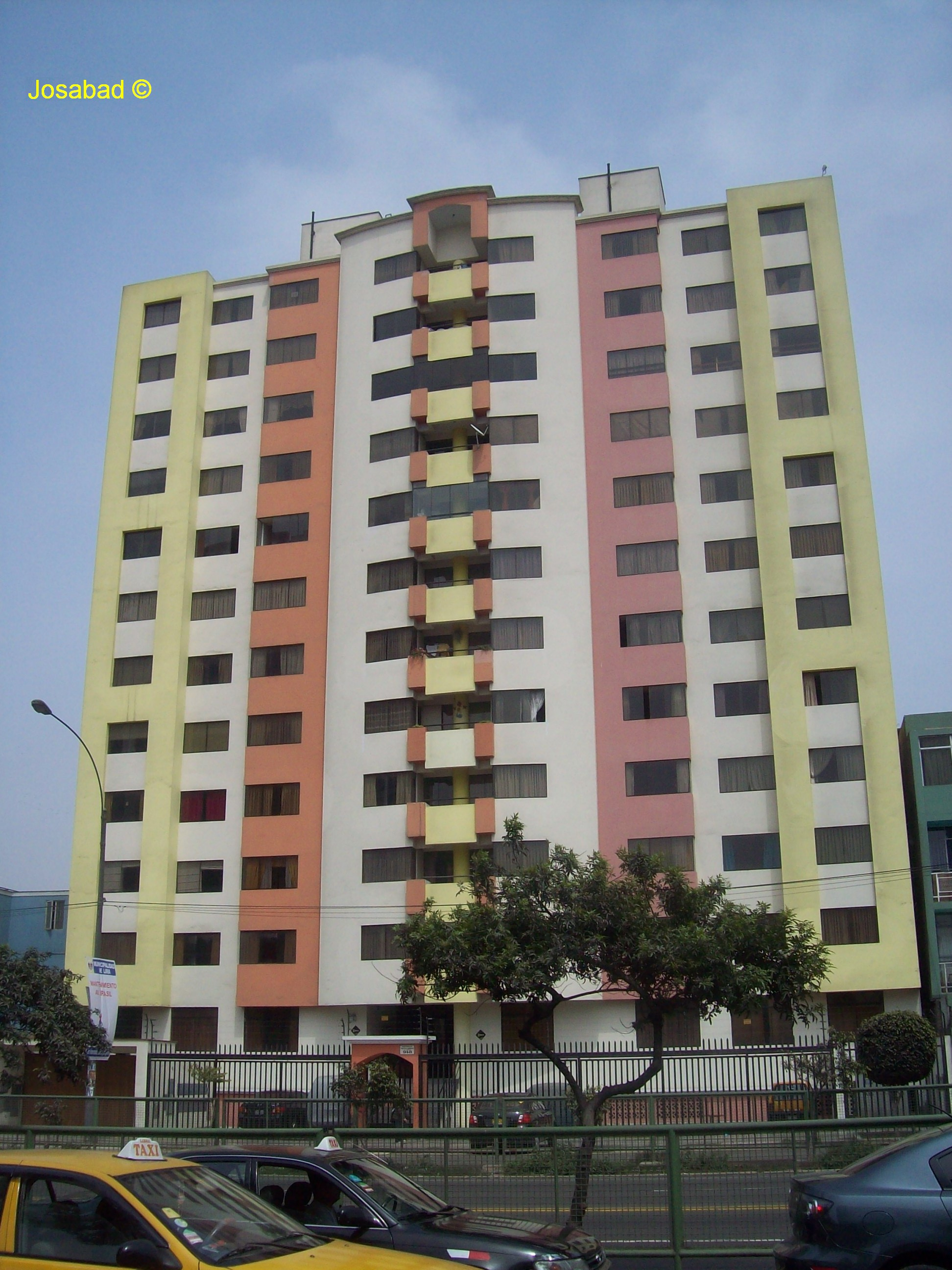 Este edificio de departamentos fue construído sobre lo que fue el Colegio de Varones **Alejandro Bertello Bollati**.